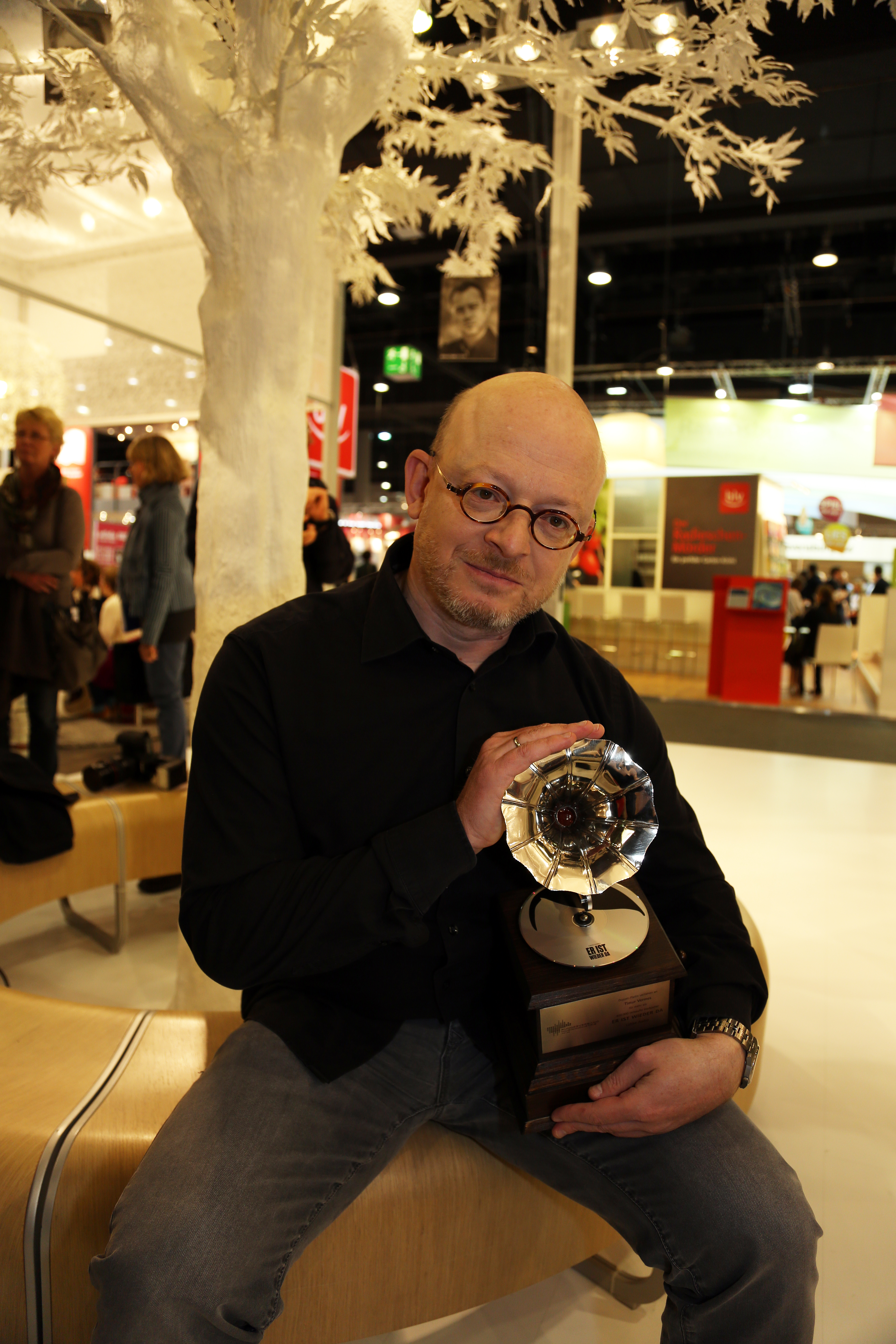 Timur Vermes bei der Frankfurter Buchmesse 2015